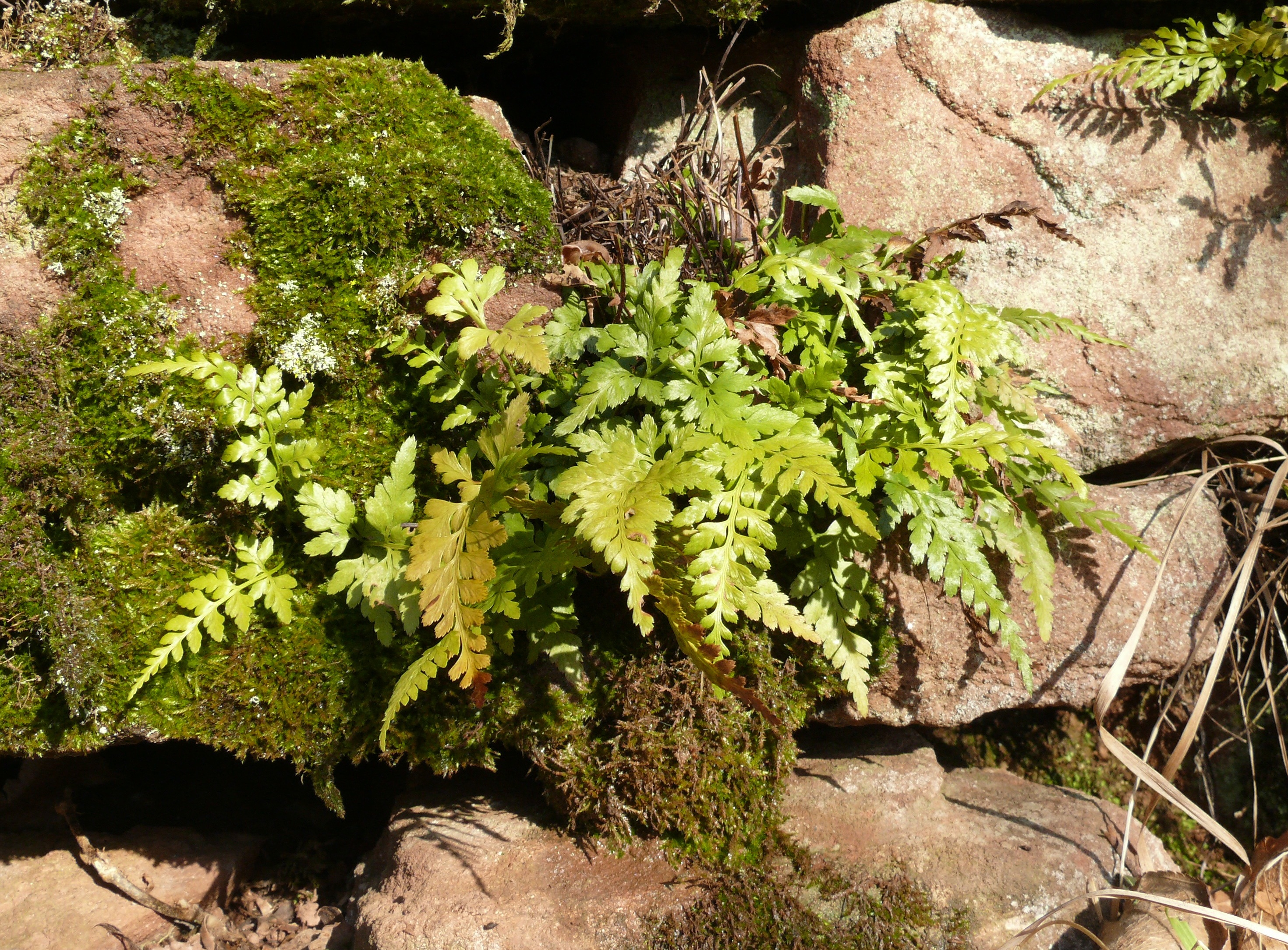 Asplenium adiantum-nigrum, Unteres Taubertal, Deutschland